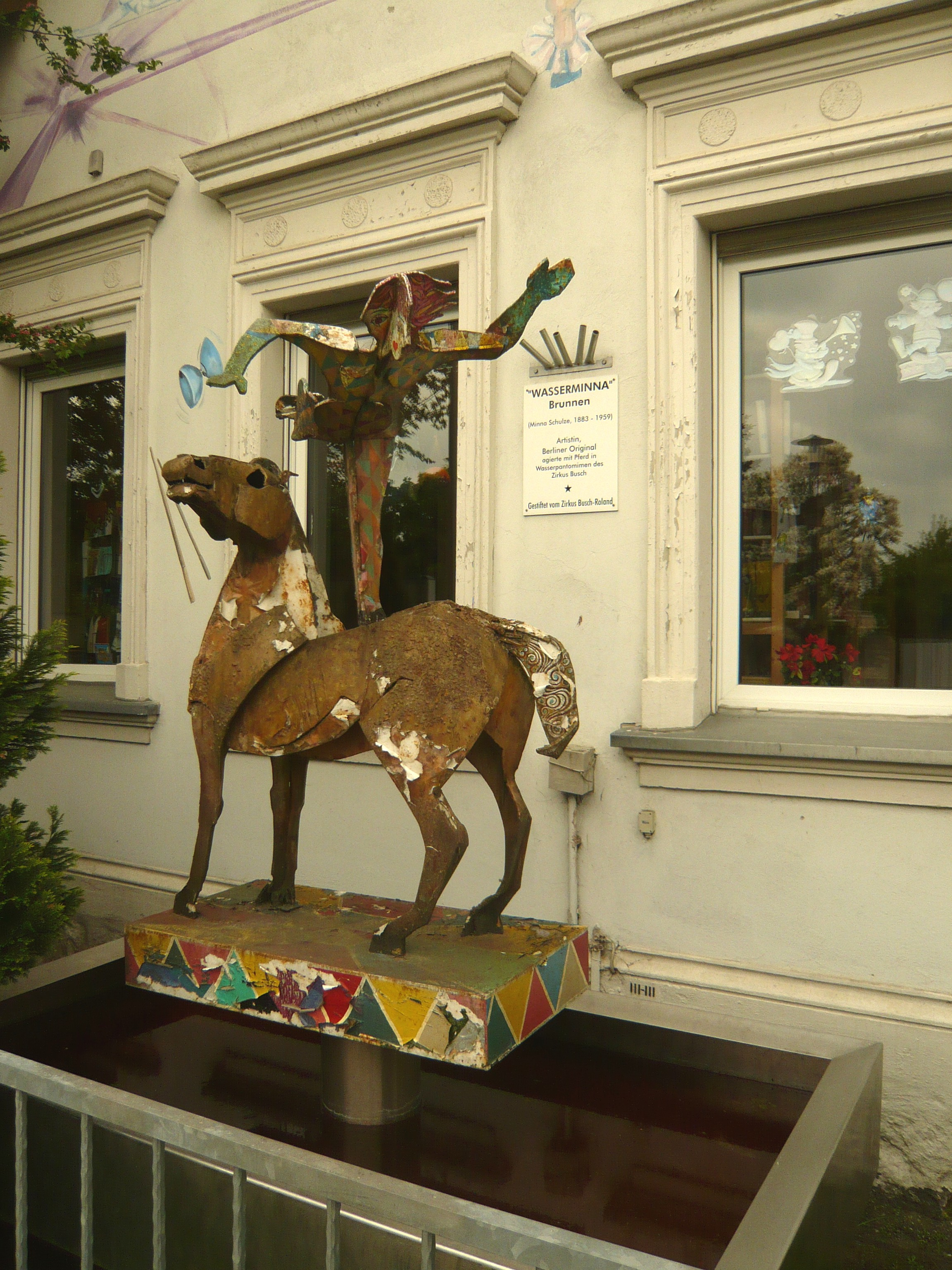 Gemeinde Wandlitz, Ortsteil Klosterfelde, Artistenmuseum, Brunnen Wasserminna